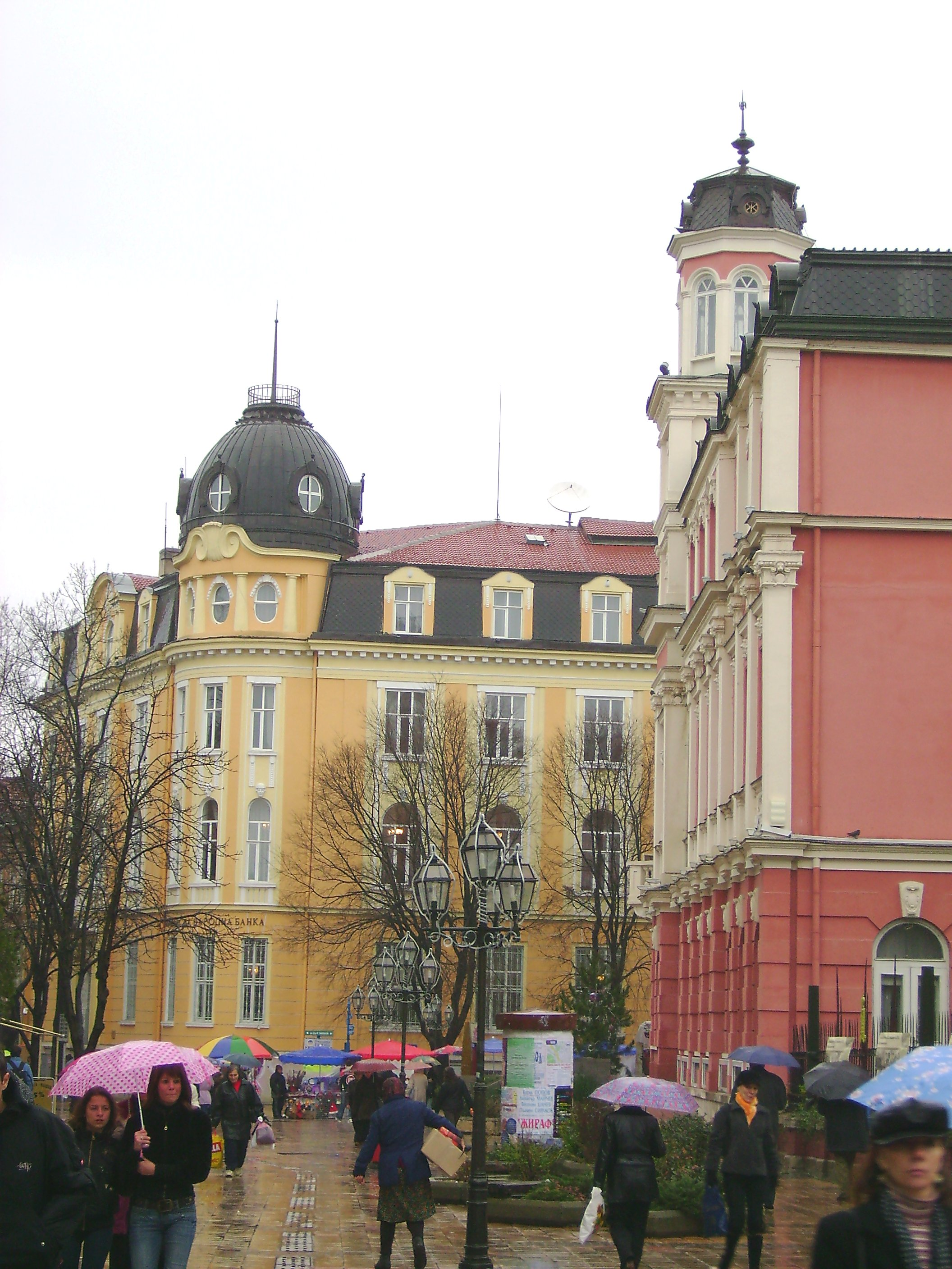 Сгради / Buildings